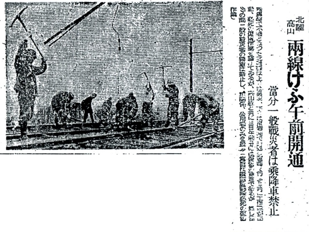 北陸高山両線けふ開通